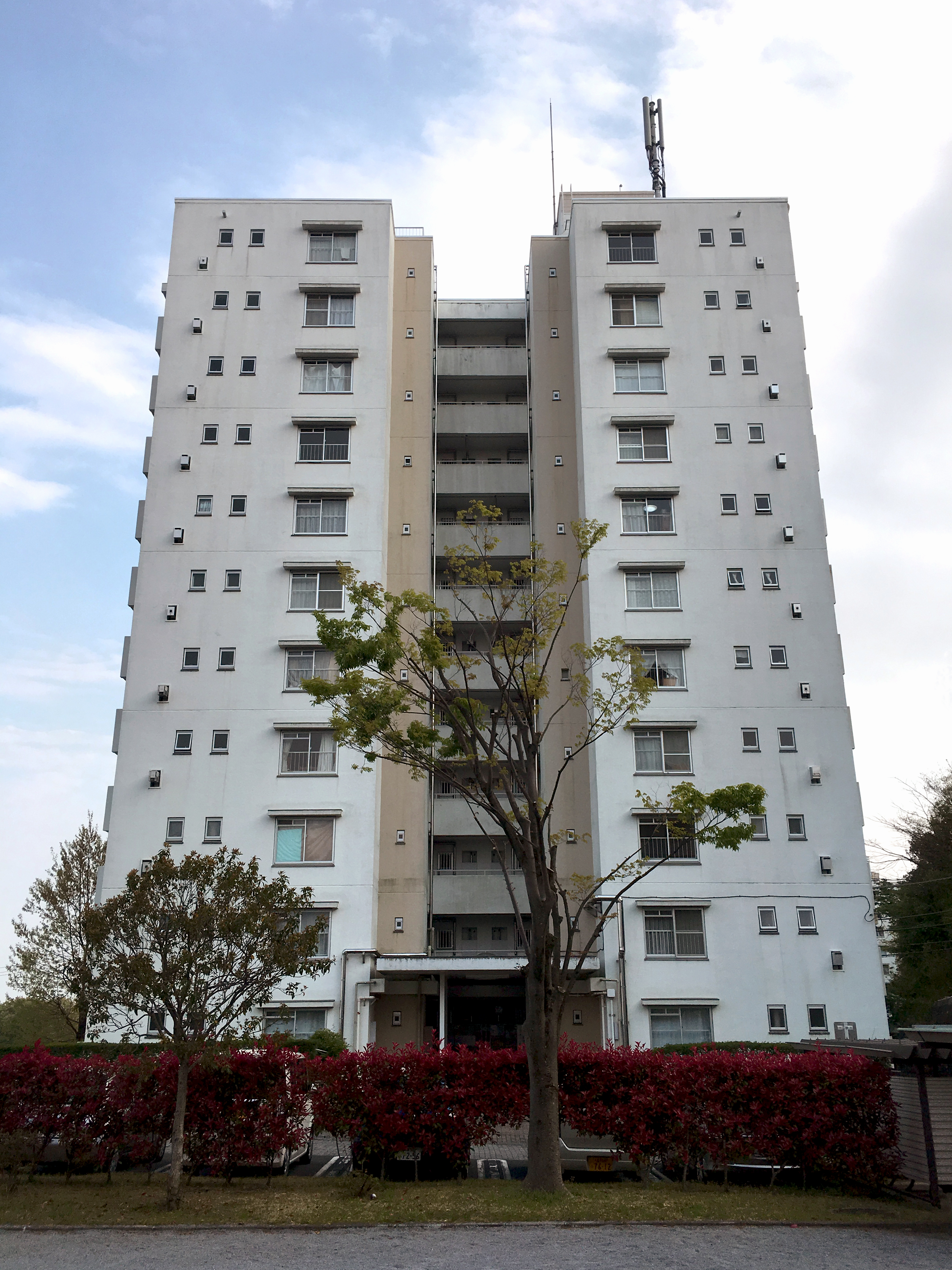 UR都市機構/百草団地1-5-3棟。2019年（平成31年）4月21日撮影。